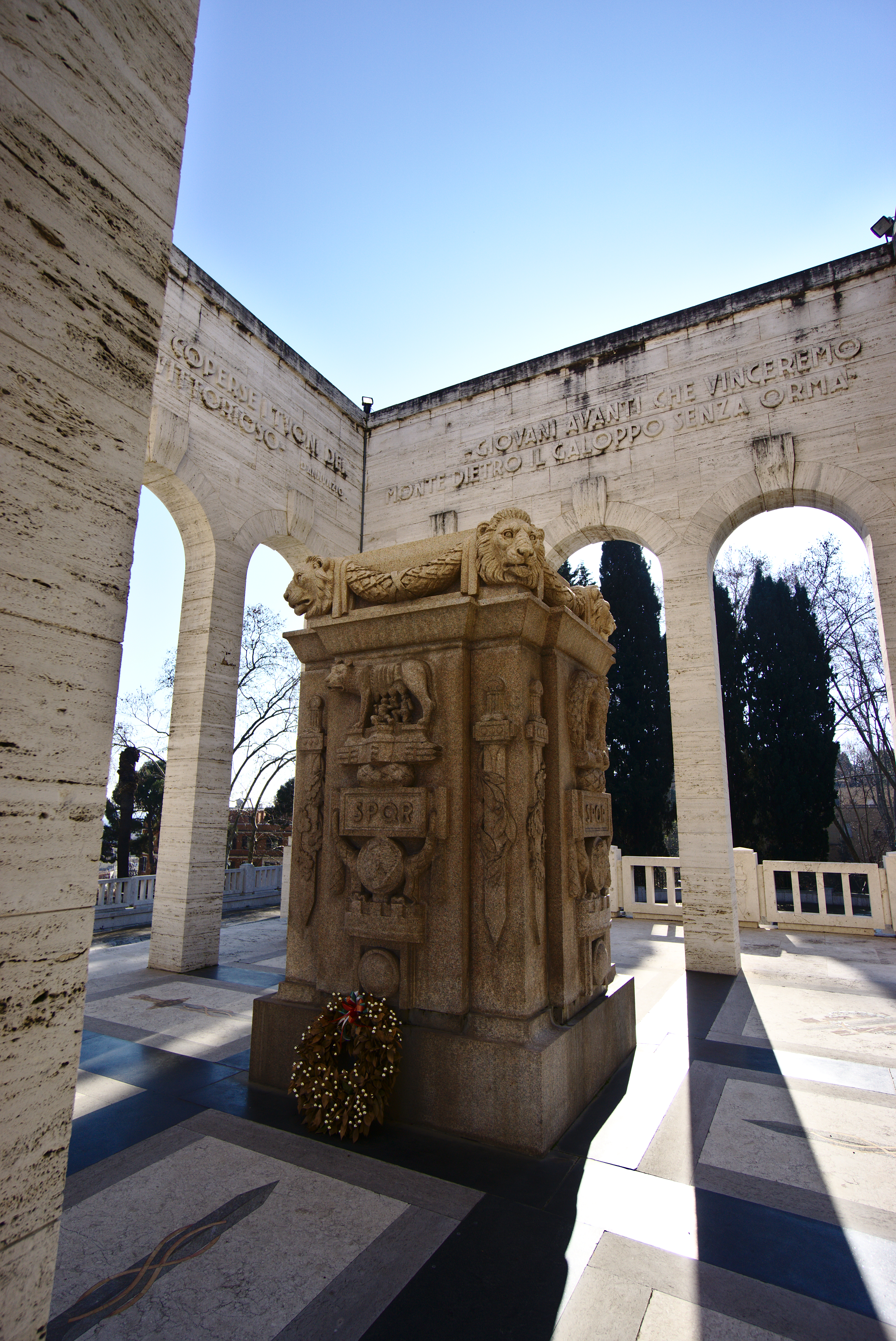 Interno del Mausoleo Ossario Garibaldino